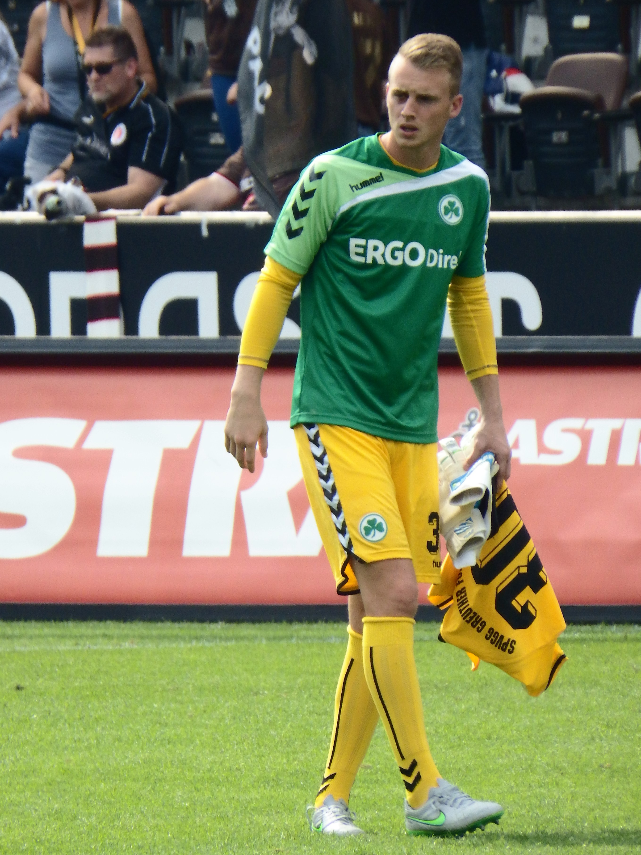 Flekken, Mark Greuther Fü